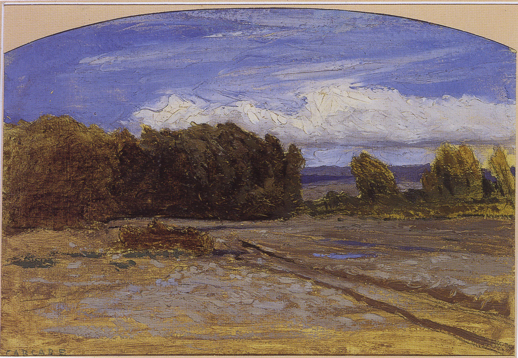 Carcare